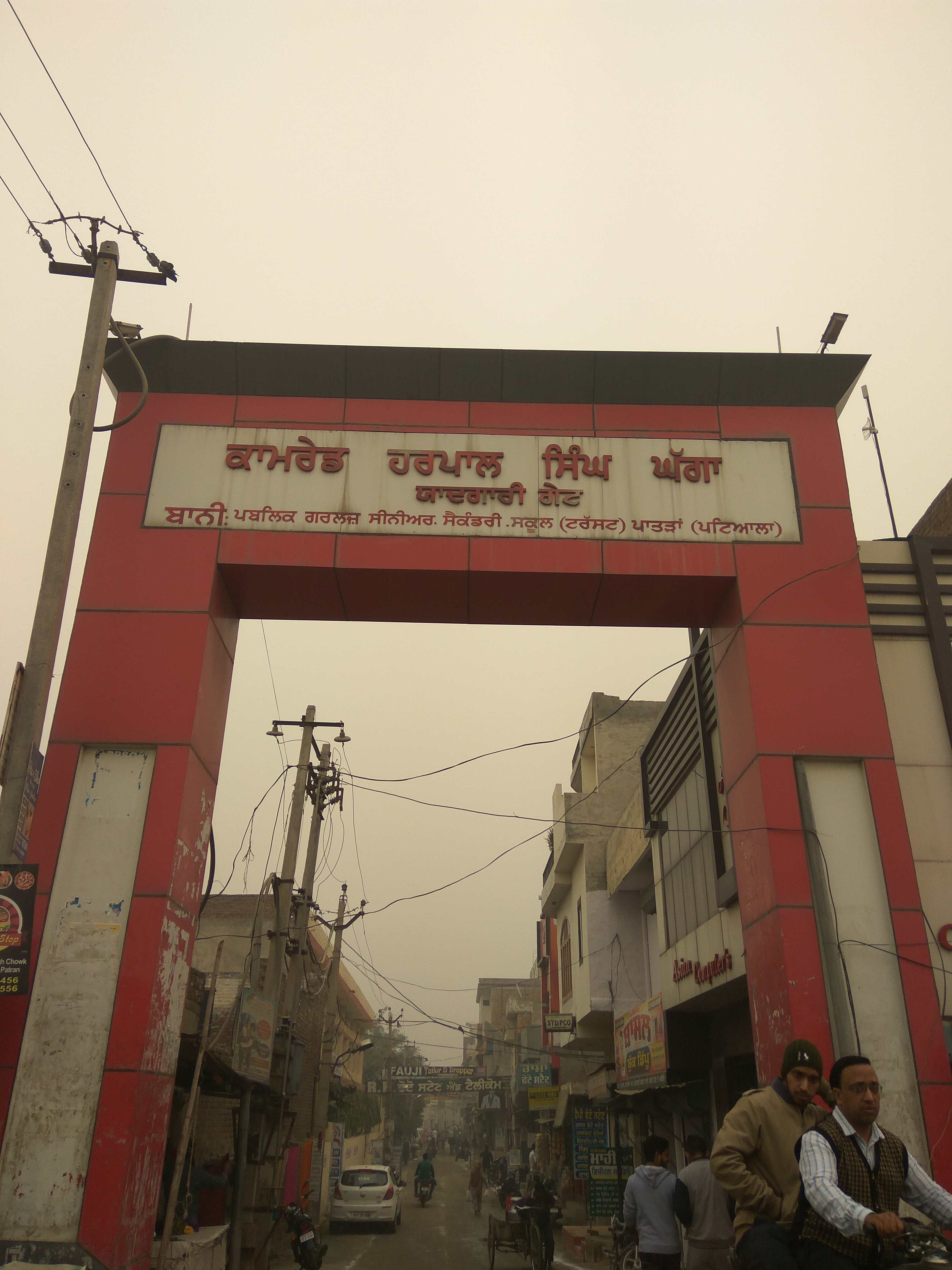 ਹਰਪਾਲ ਘੱਗਾ ਯਾਦਗਾਰੀ ਗੇਟ, ਪਾਤੜਾਂ